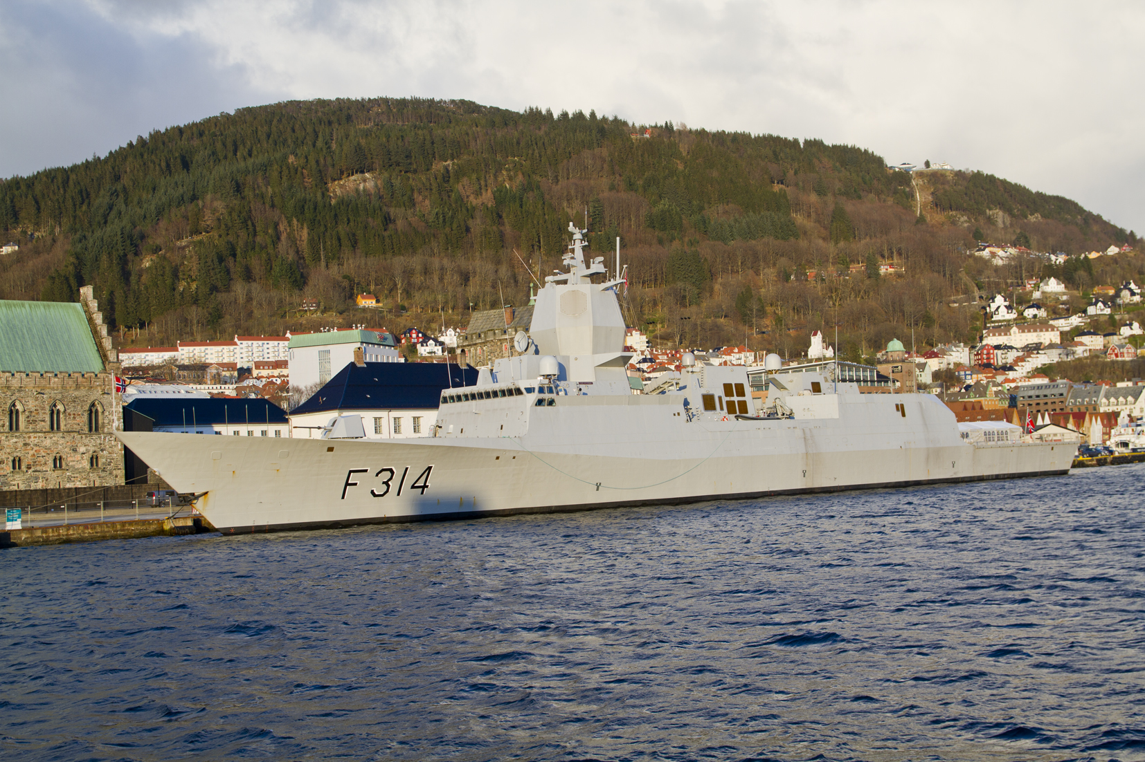 HNoMS Thor Heyerdahl, Strandsiden, Vågen, Bergen, Hordaland, Norway